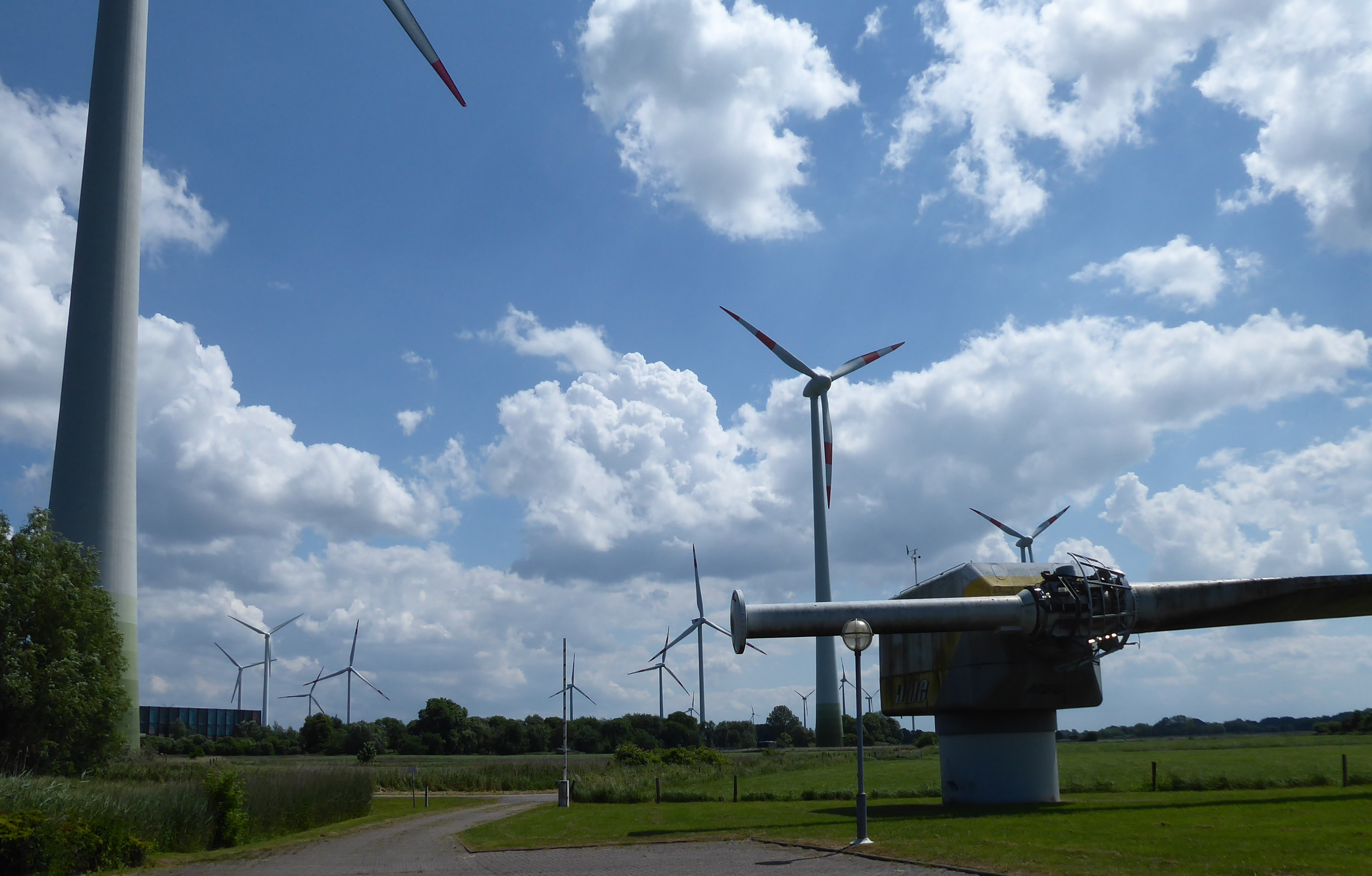 Jade-Windpark am Eingang